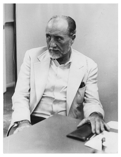 Retrato en un interior de José Antonio Martínez Súarez, sentado de medio cuerpo y tres cuartos de perfil izquierdo.